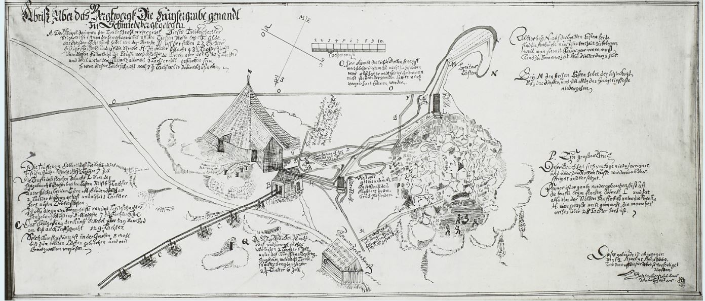 Darstellung der Tagesanlagen der Kupfergrube Sadisdorf von 1660